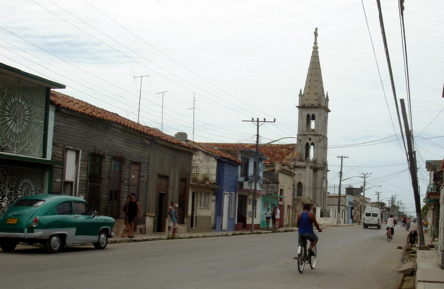 Street in Cárdenas, Cuba